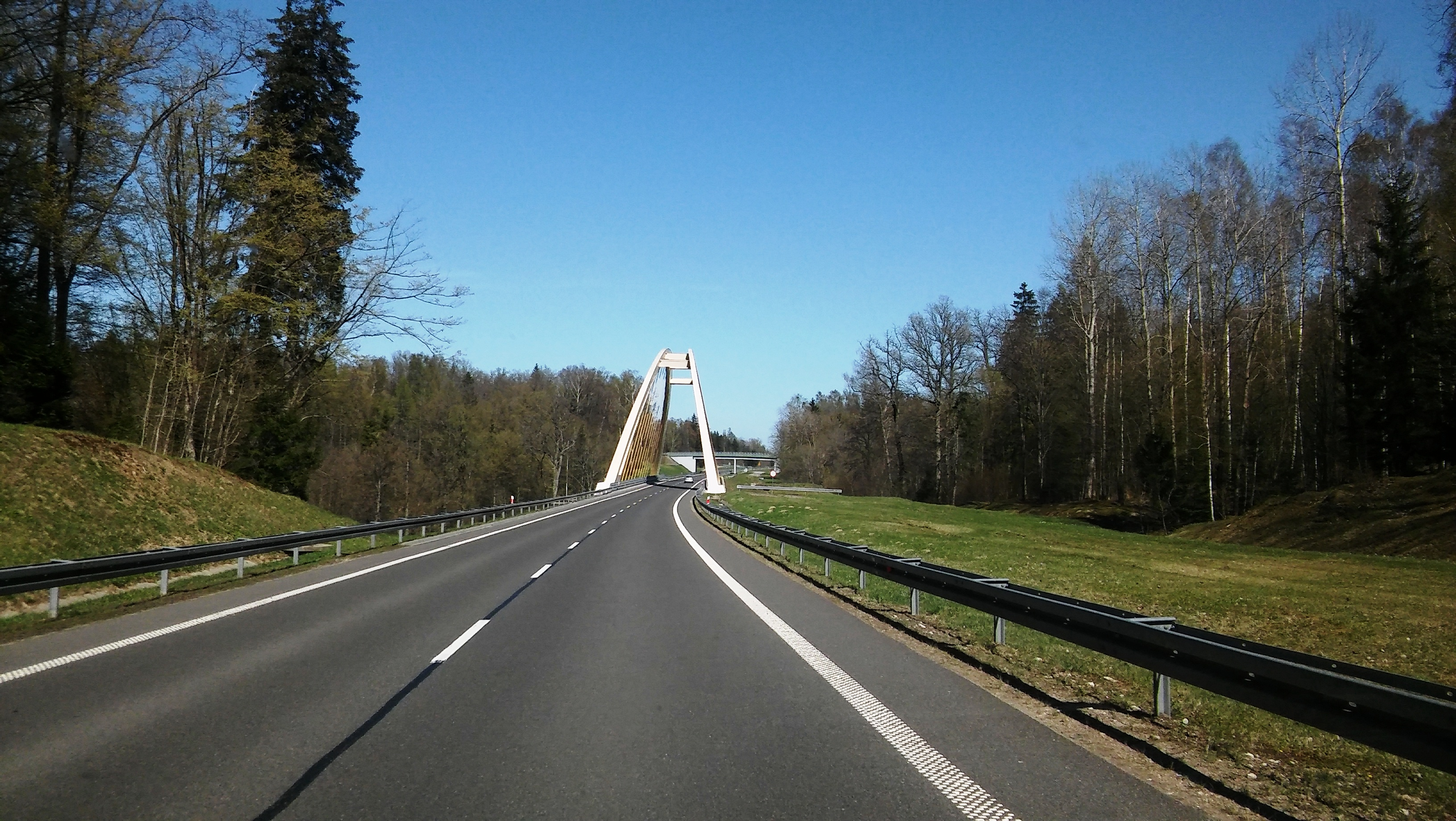 Most łukowy na S22 nad rzeką Banówka o rozpiętości 122,40 m. Obiekt o dwudźwigarowym łukowym ustroju nośnym, w formie dźwigarów skrzynkowych o zmiennej wysokości w przekroju poprzecznym. Dźwigary główne podwieszone są do dźwigarów łukowych za pomocą cięgien linowych w rozstawie co 7,20 m. Czas powstania: Maj 2007 – Wrzesień 2008